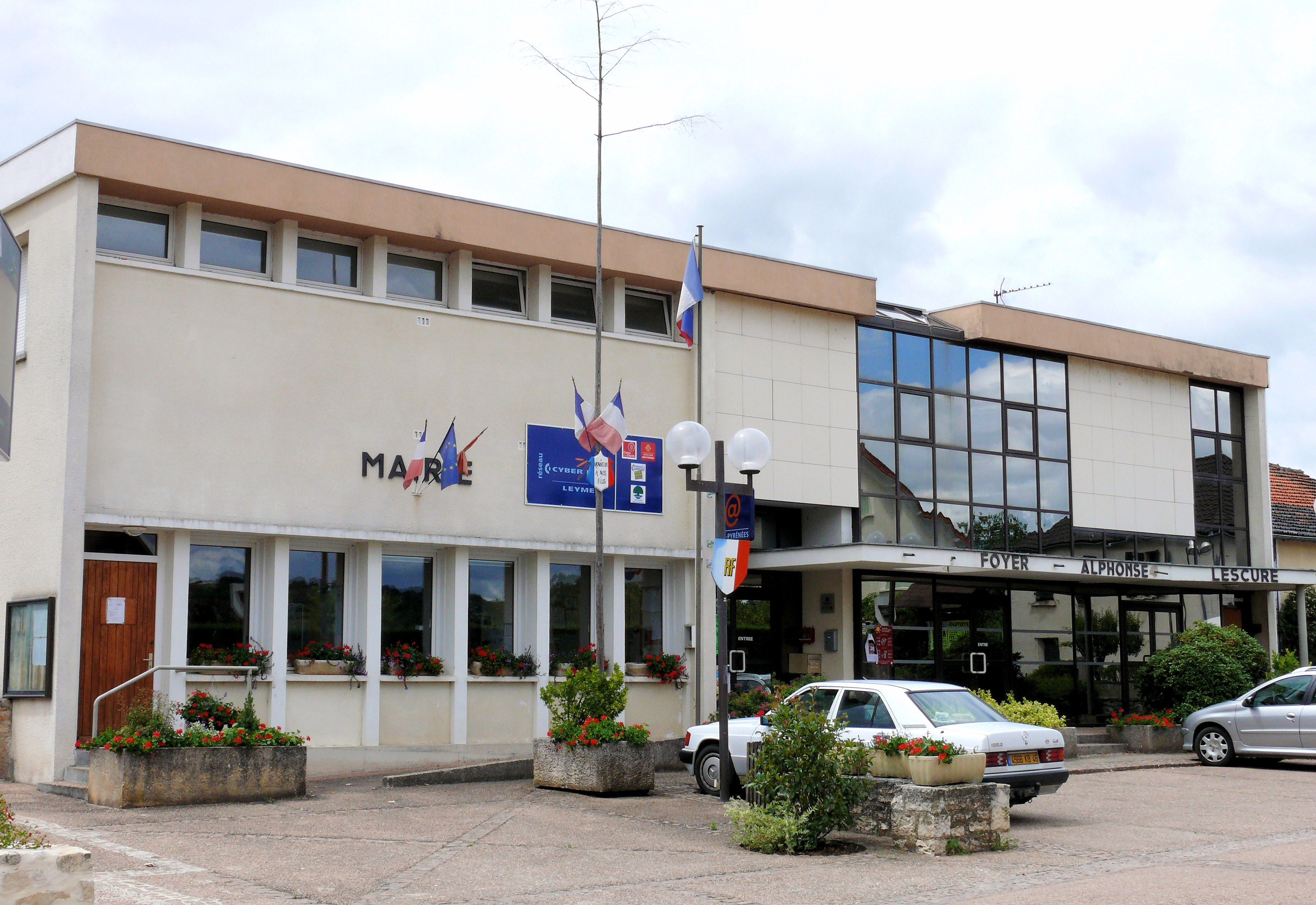 Leyme - Mairie